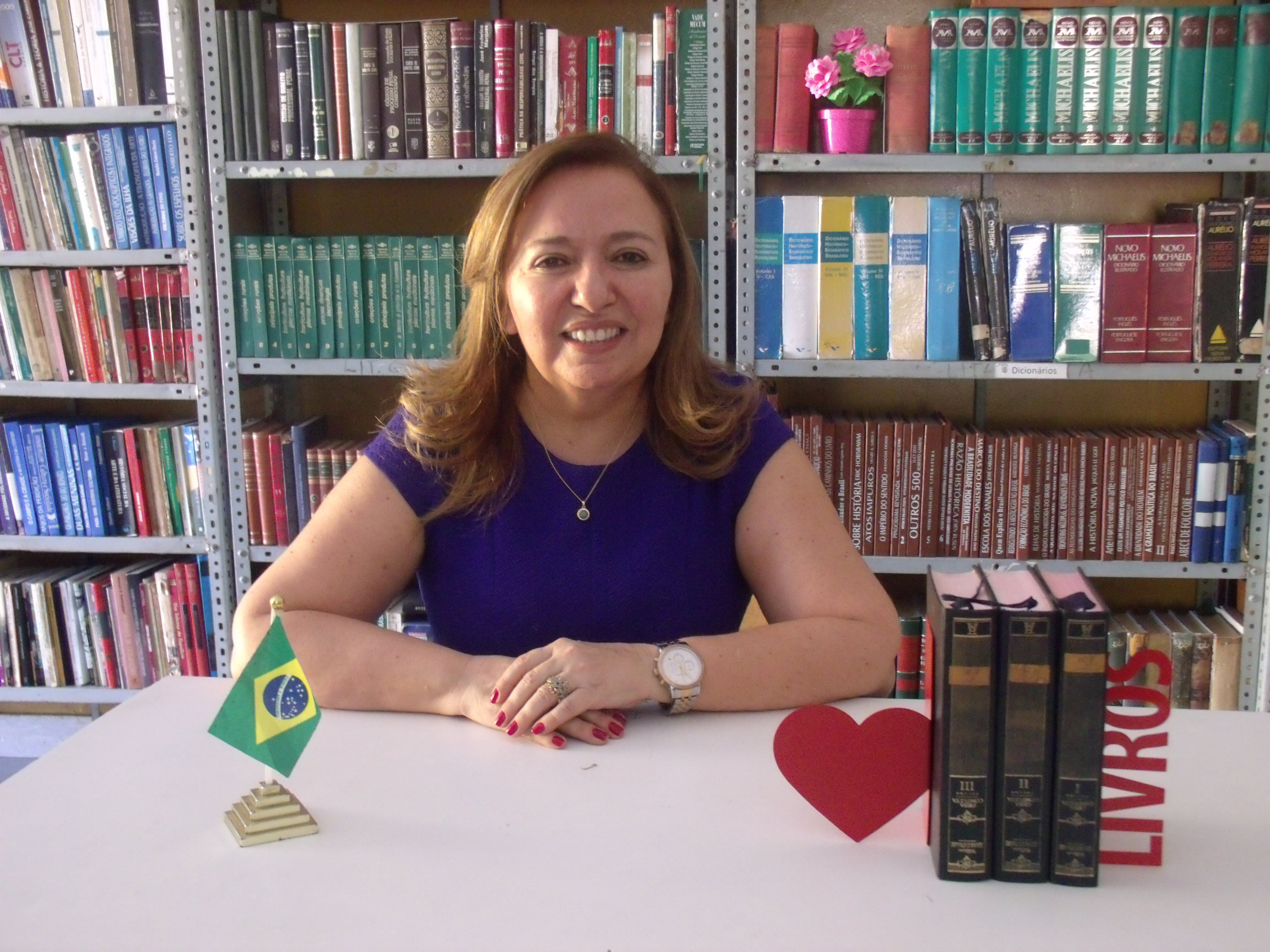 Secretária de Educação de Campo Maior Piauí, Conceição Lima.